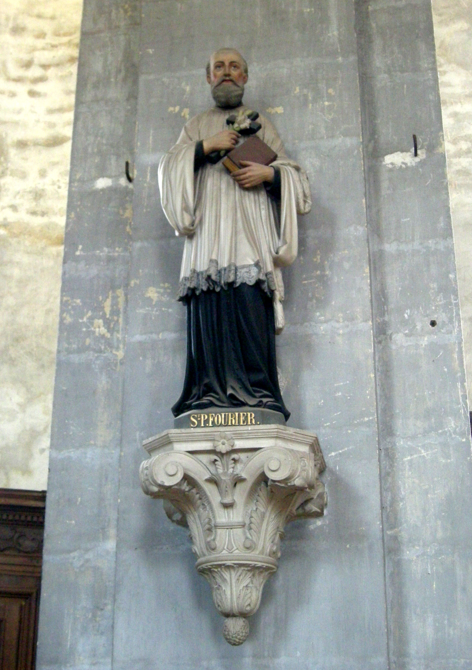 Statue de Saint Pierre Fourier, en bois polychrome du XVIIIe siècle, à l'églse abbatiale de Moyenmoutier (Vosges)